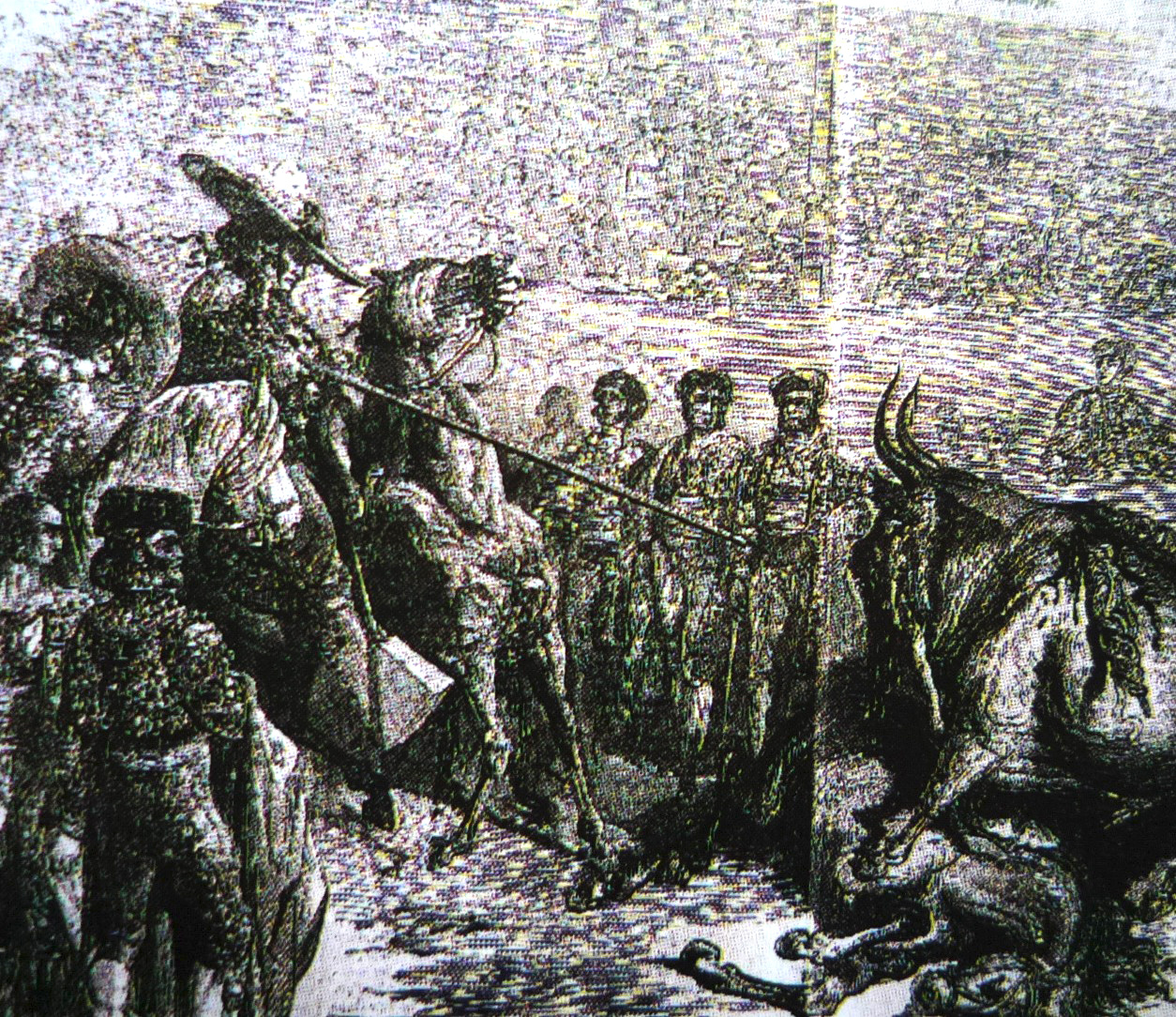 Gust.Doré_corrida1860+.JPG